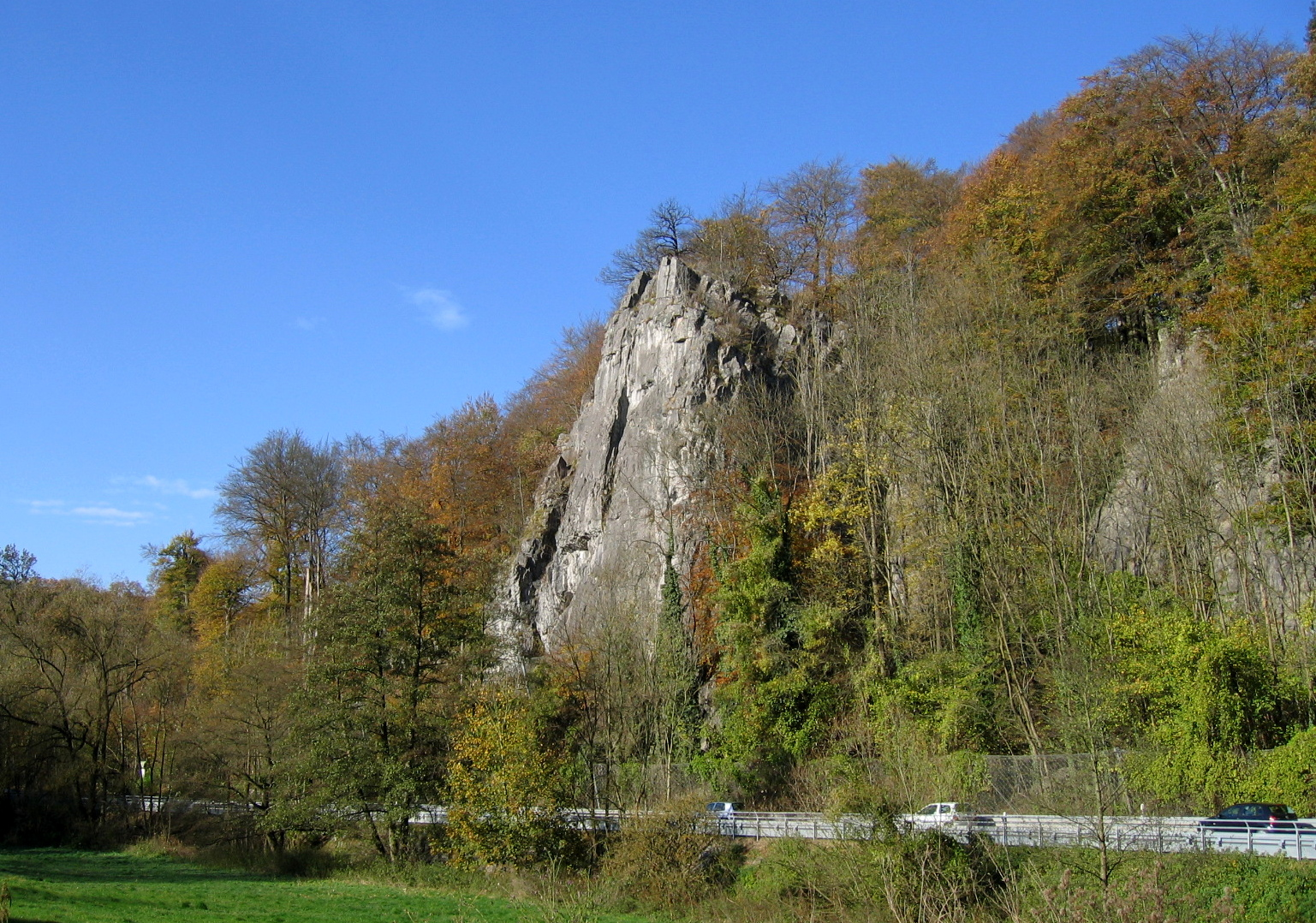 Felsformation "Sieben Jungfrauen" im Hönnetal, Balve.